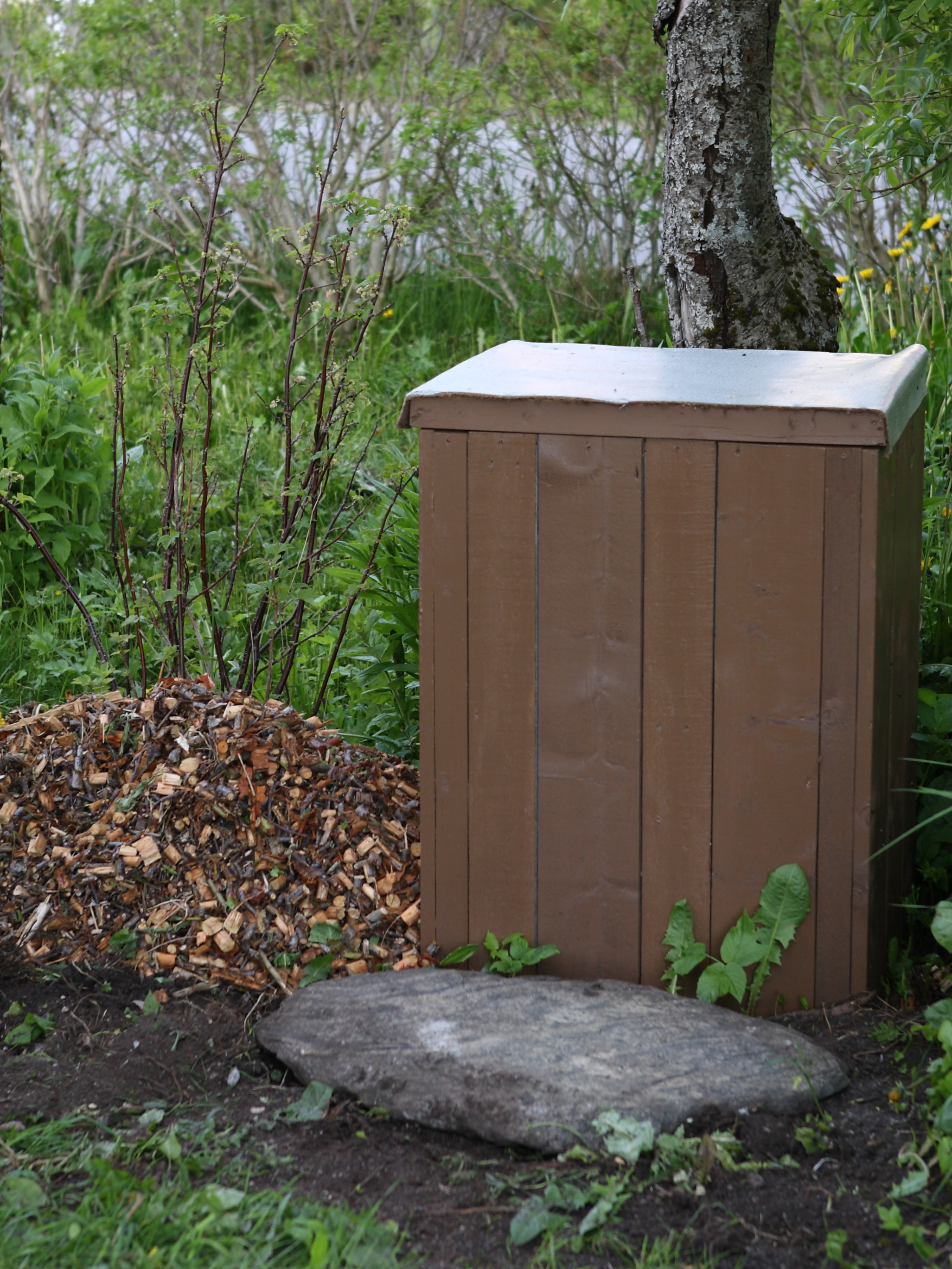 Hjemmesnekret kompostbinde i hage i Brønnøy.